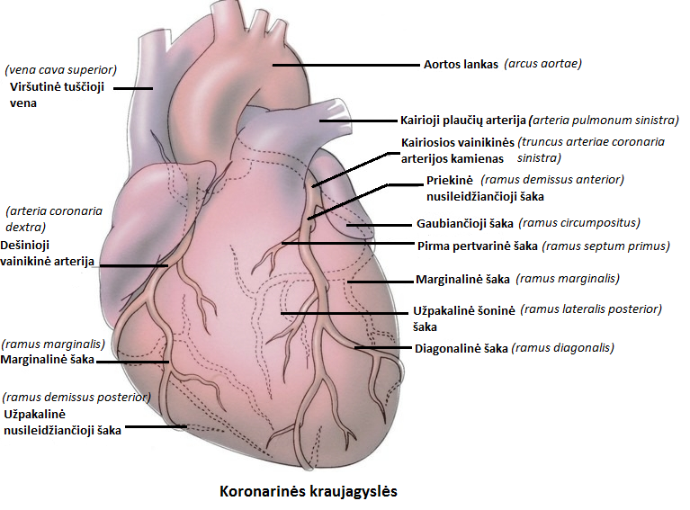 Koronarinės kraujagyslės